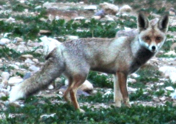 Arabian Red Fox picture taken in Al Sukhnah, Jordan